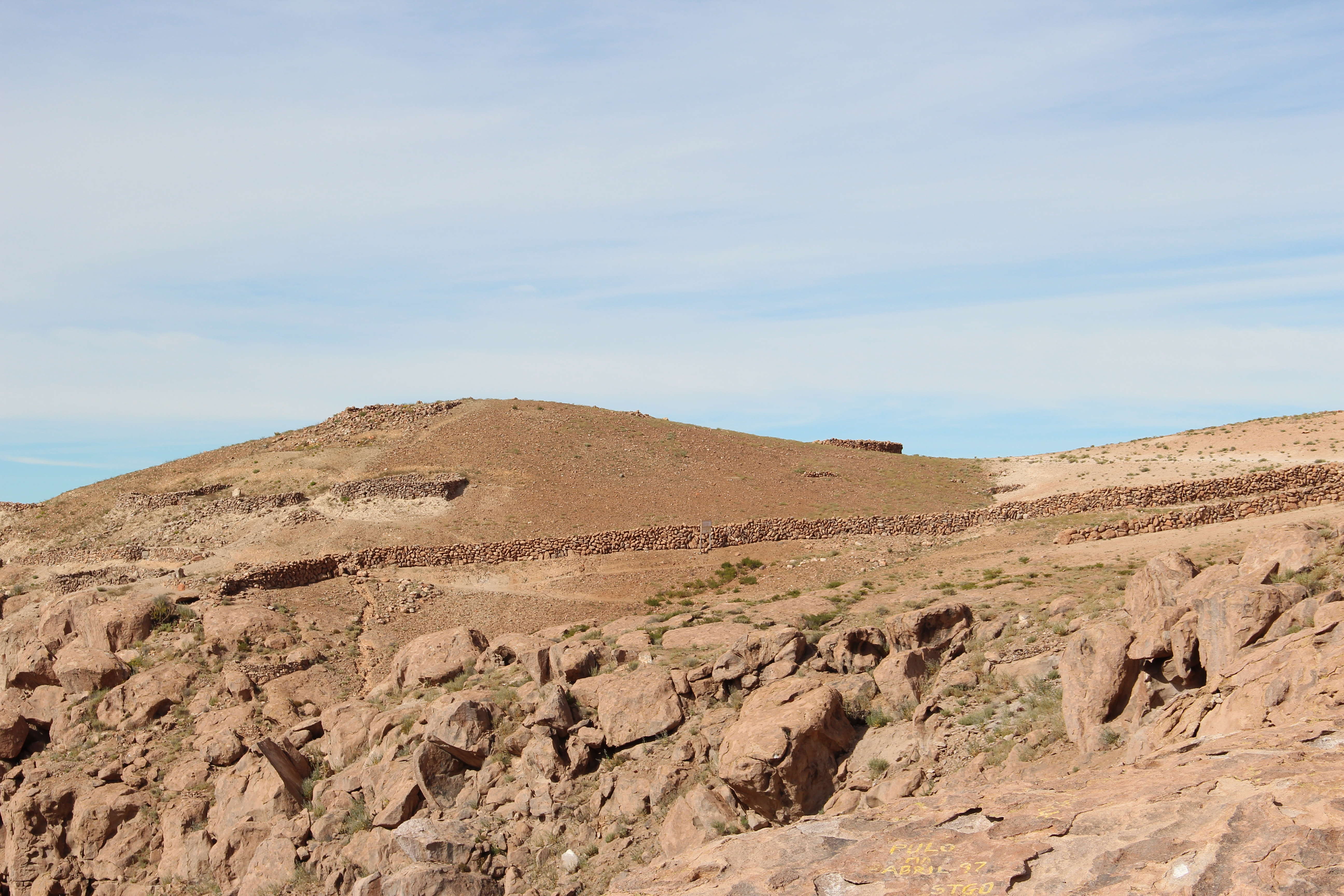 Pucará de Copaquilla This is a photo of a national monument in Chile: 262